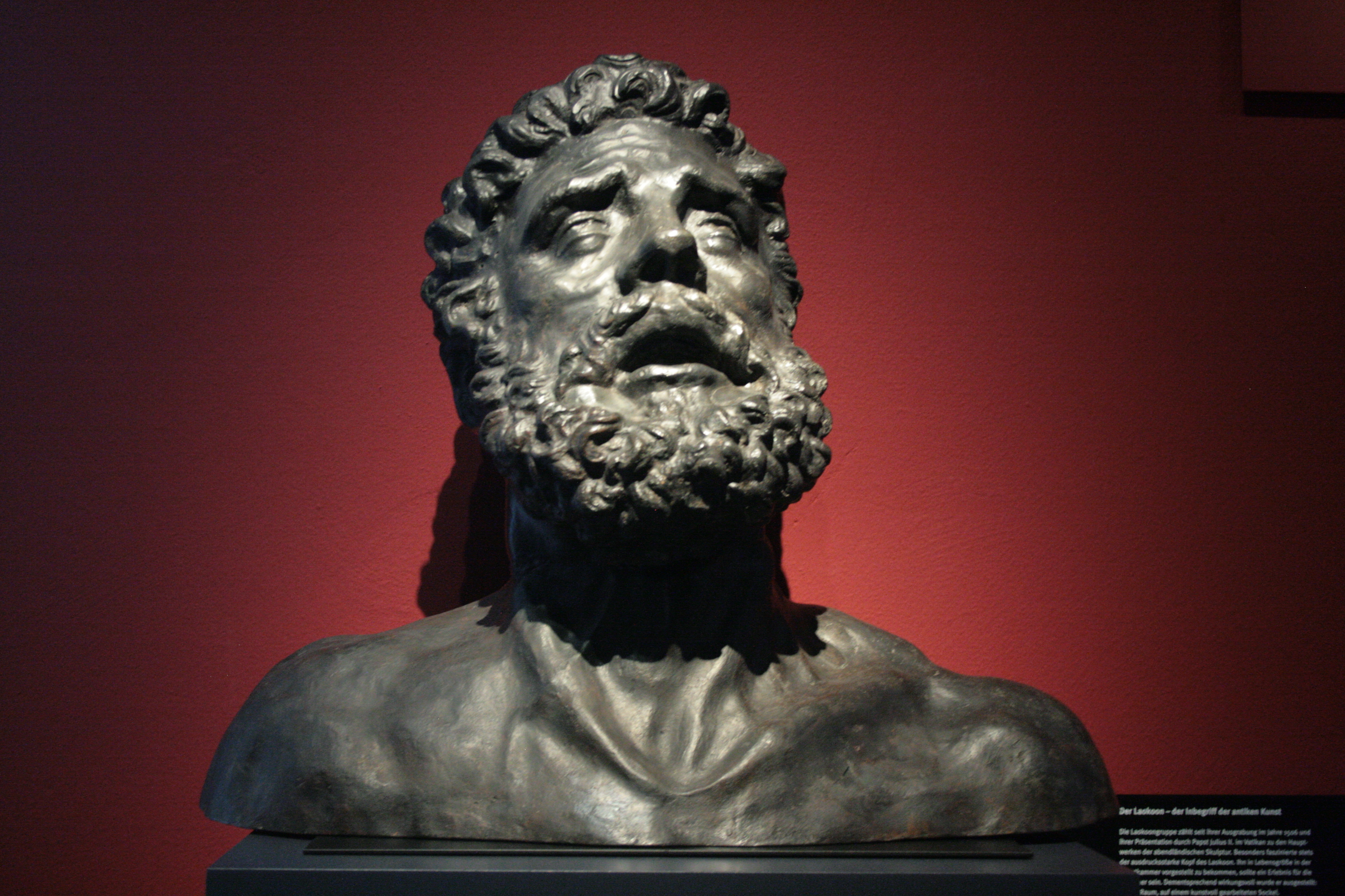 Replica del gruppo statuario tardo-ellenistico del Laocoonte, 1630.